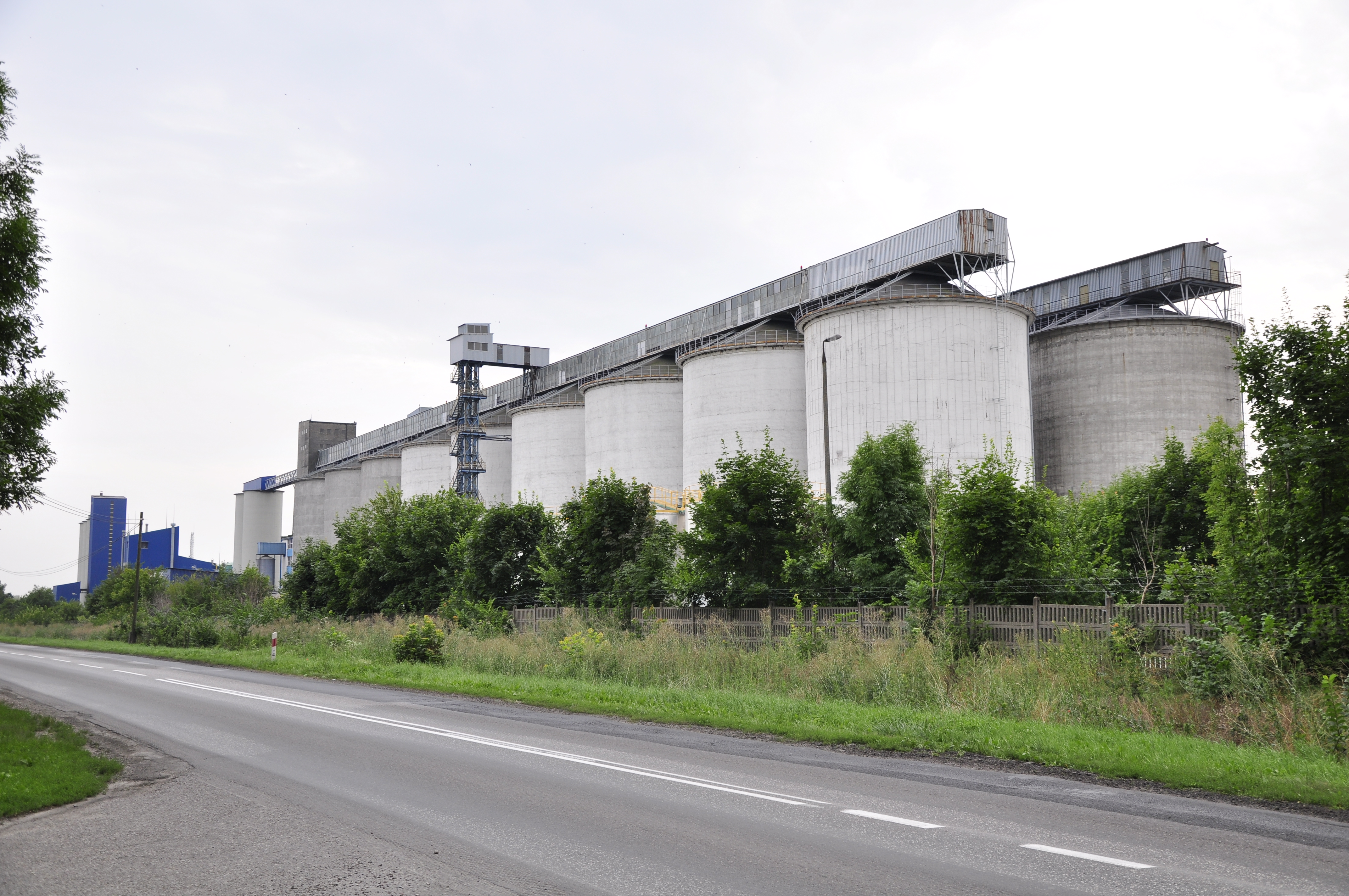 Kruszwica Speiseölfabrik Polen